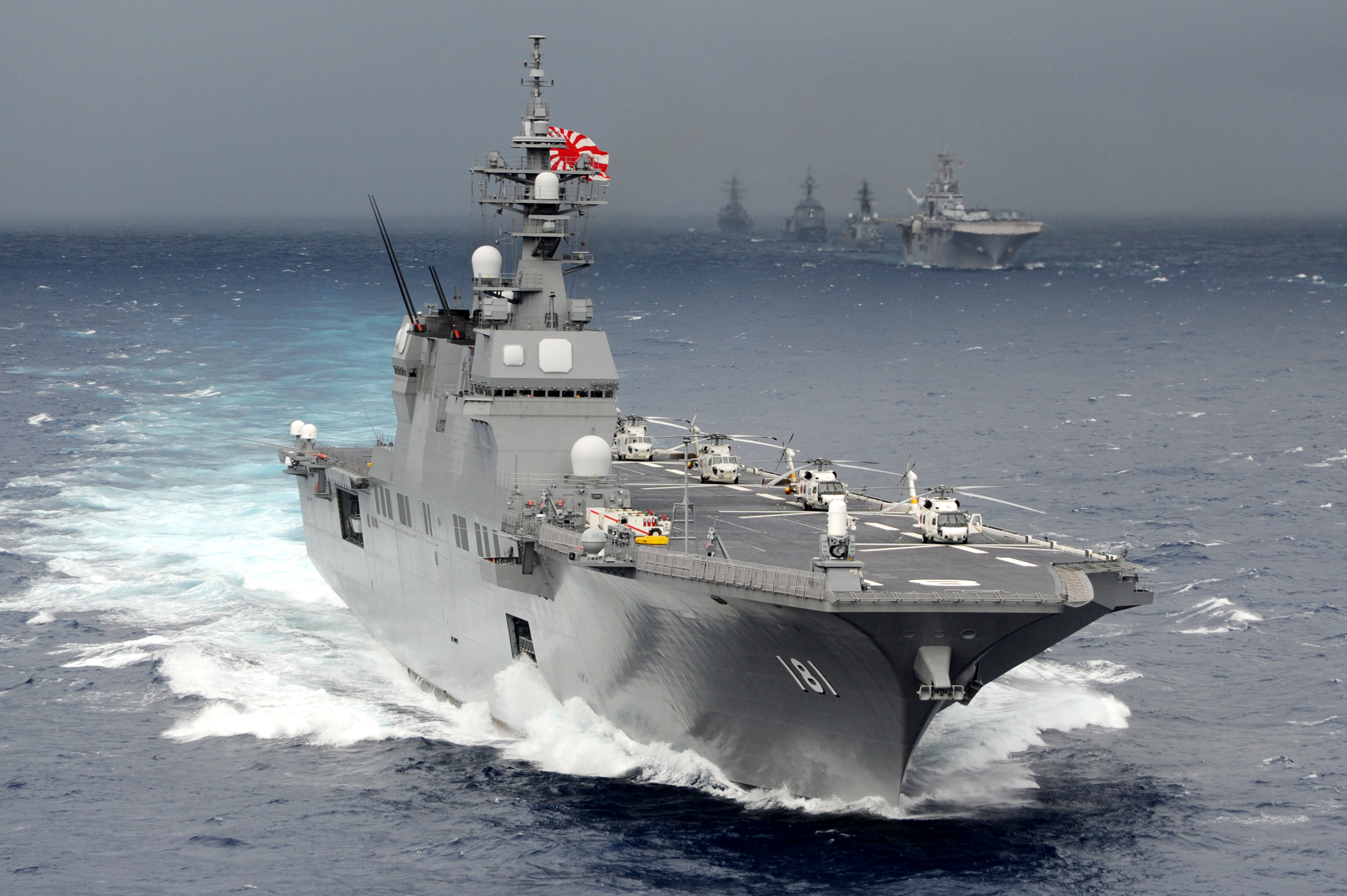 DDH-181 ひゅうが